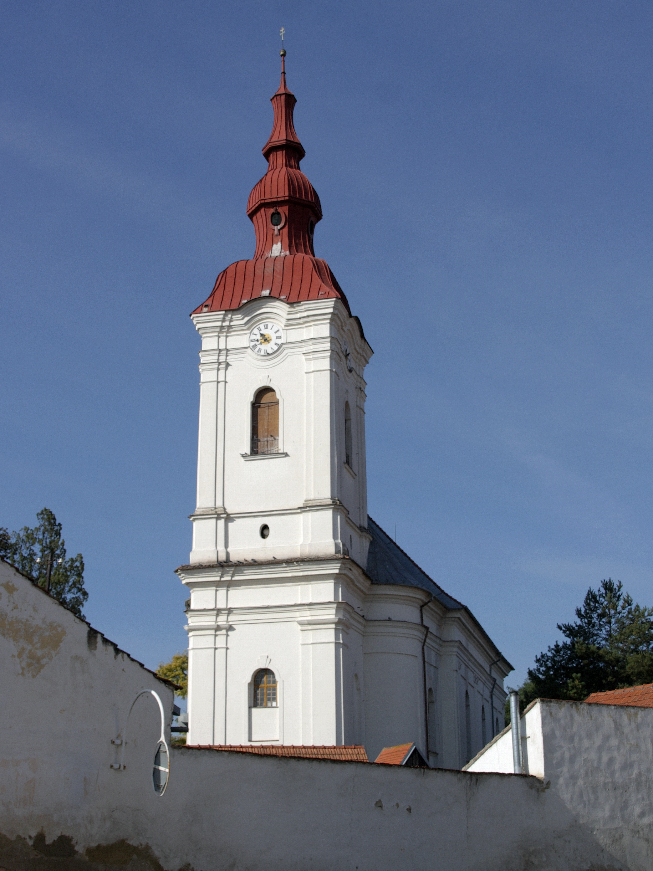 Modřice - kostel sv Gotharda.